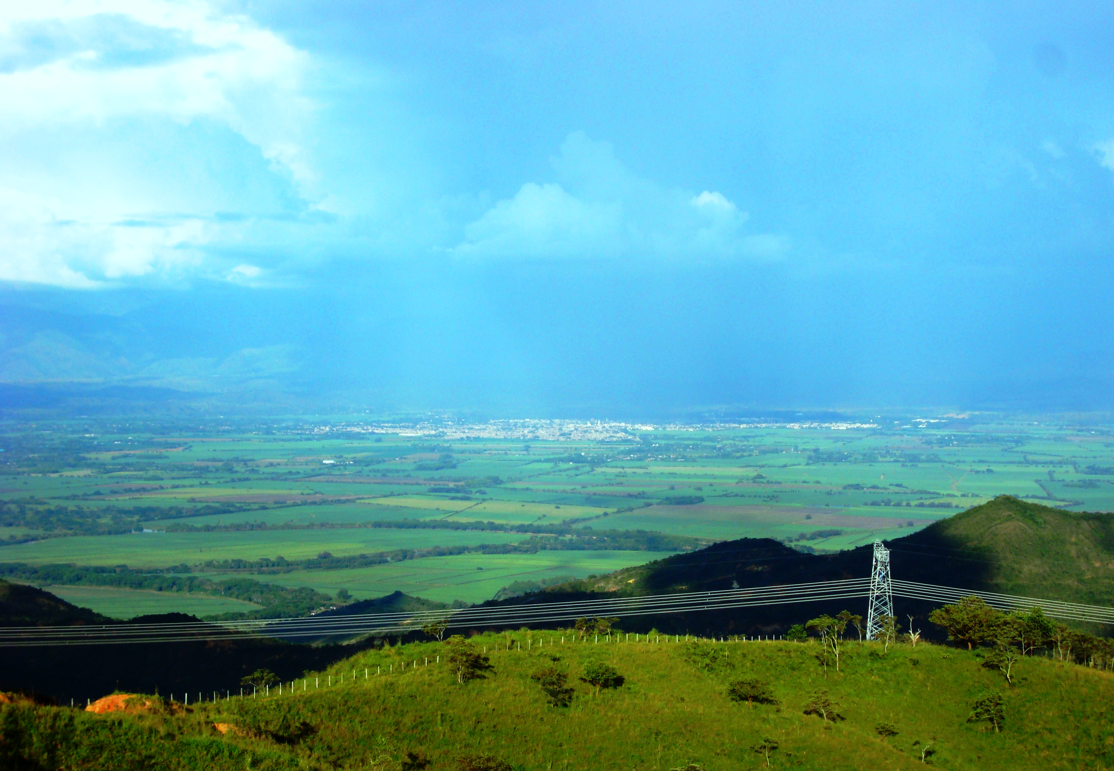 Panorámica de Tuluá desde la cordillera Occidental